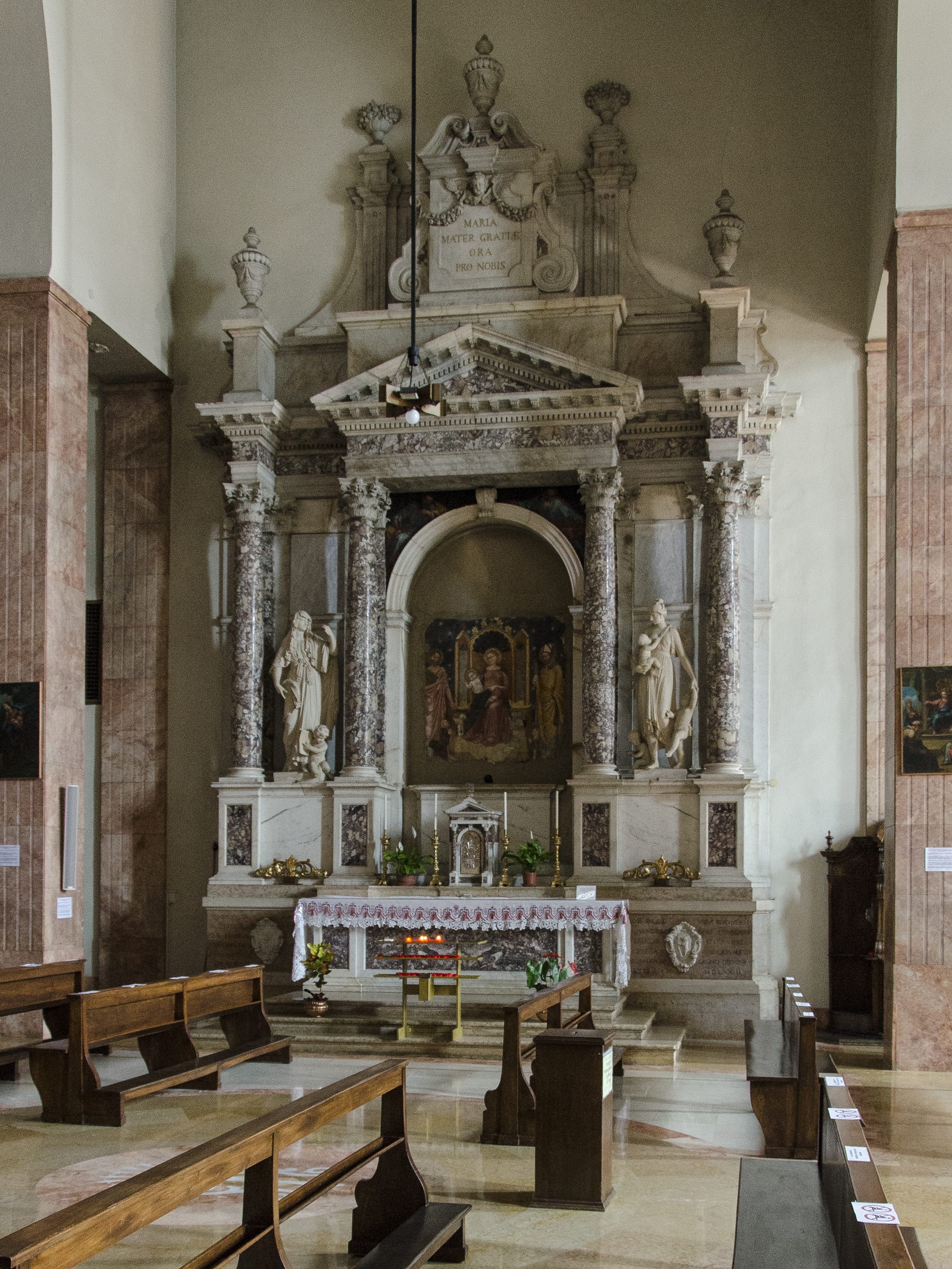 Interno della chiesa di Santa Maria della Scala, a Verona